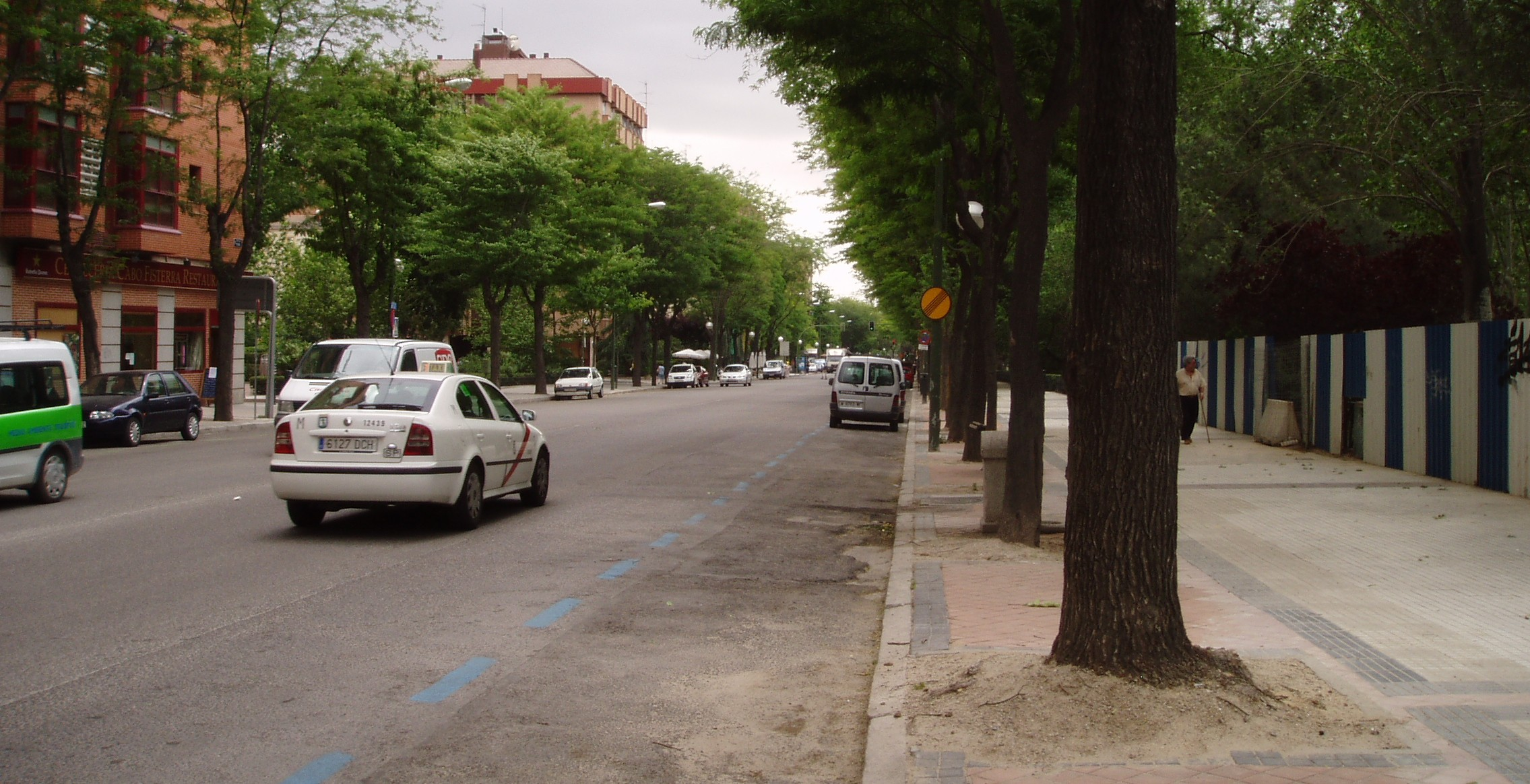 Paseo de Yeserías. Barrio de las Acacias. Arganzuela. Madrid. España.